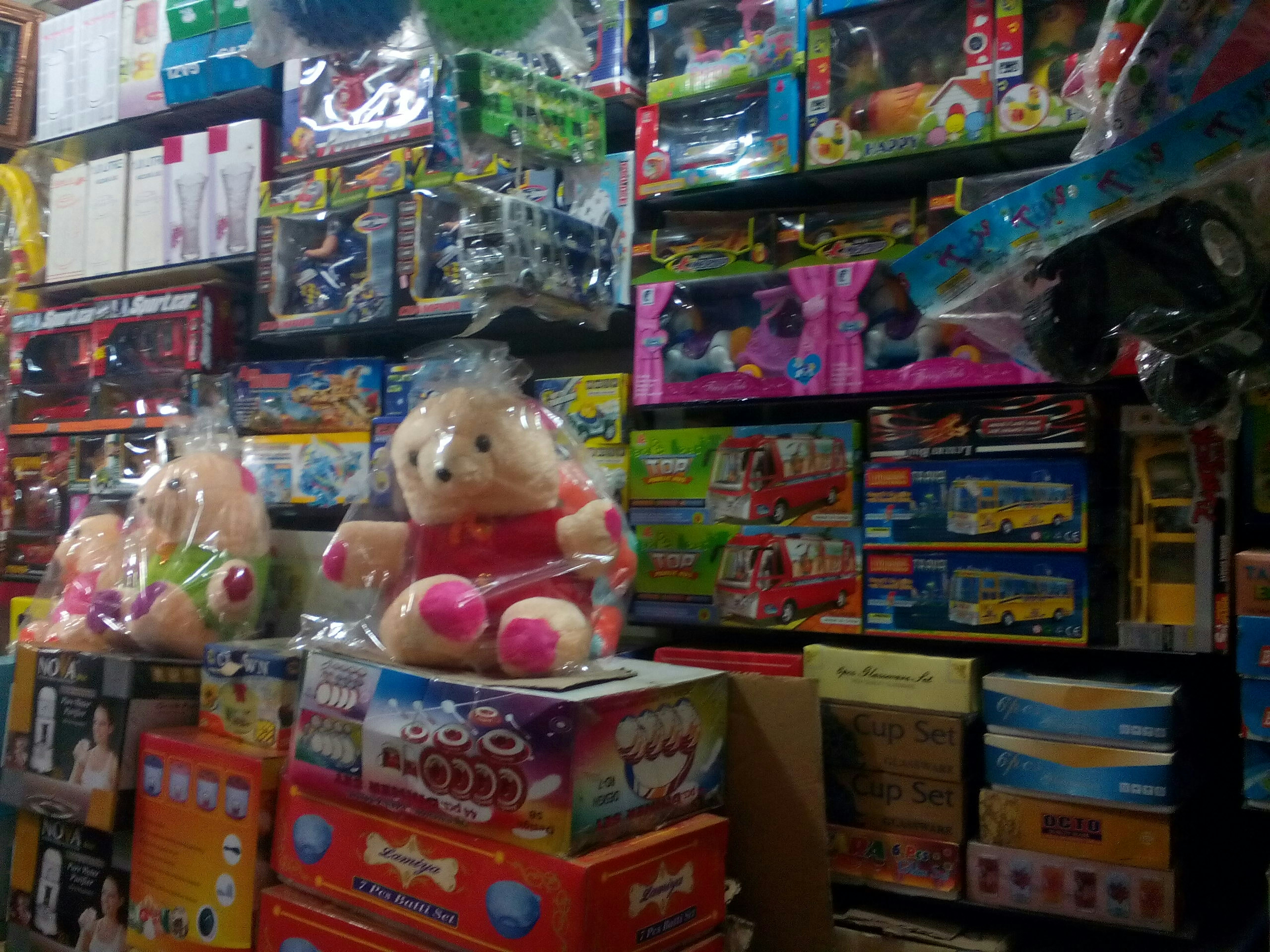 আধুনিক চক সুপার মার্কেট